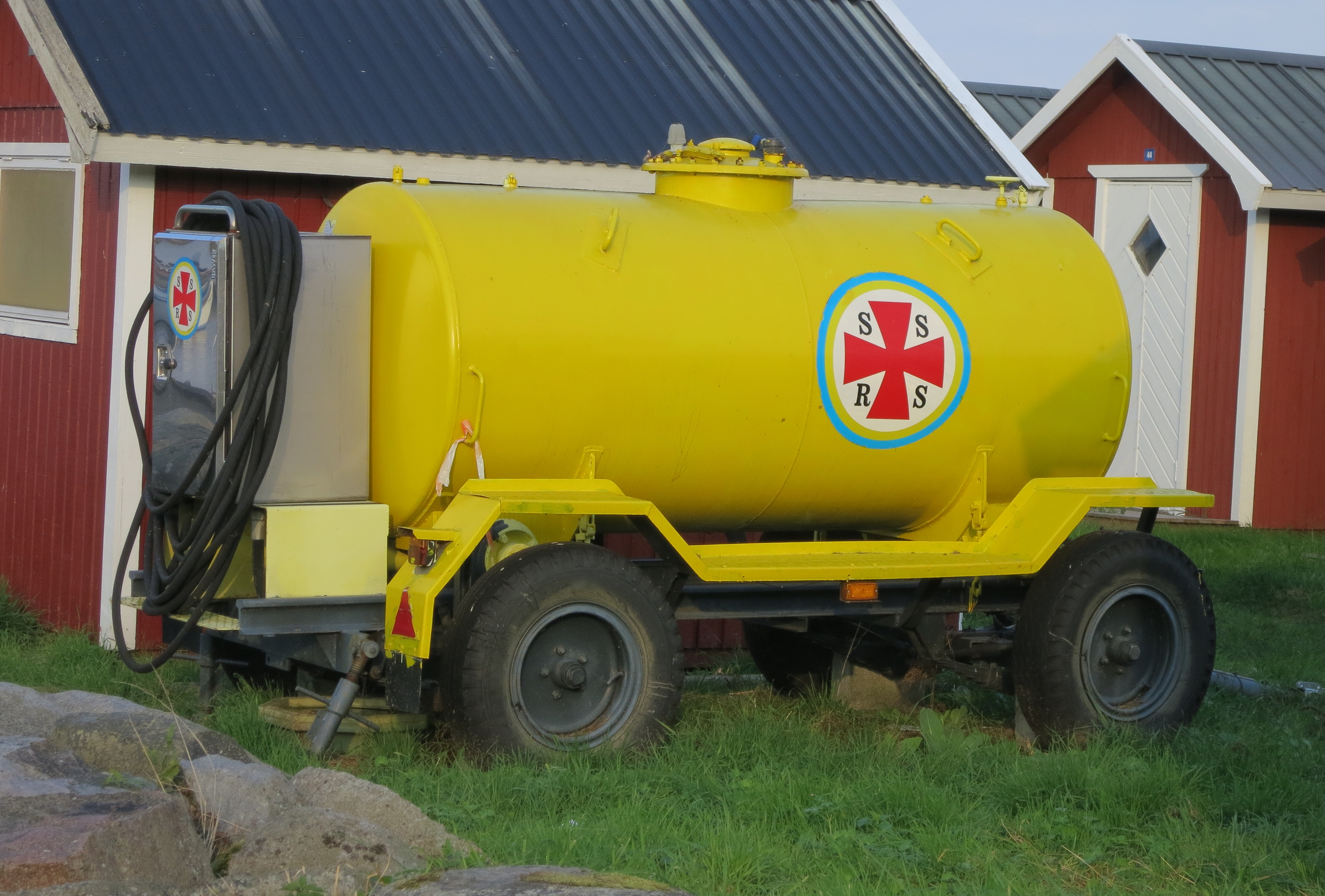 Sjöräddningens tanksläp, Kivik